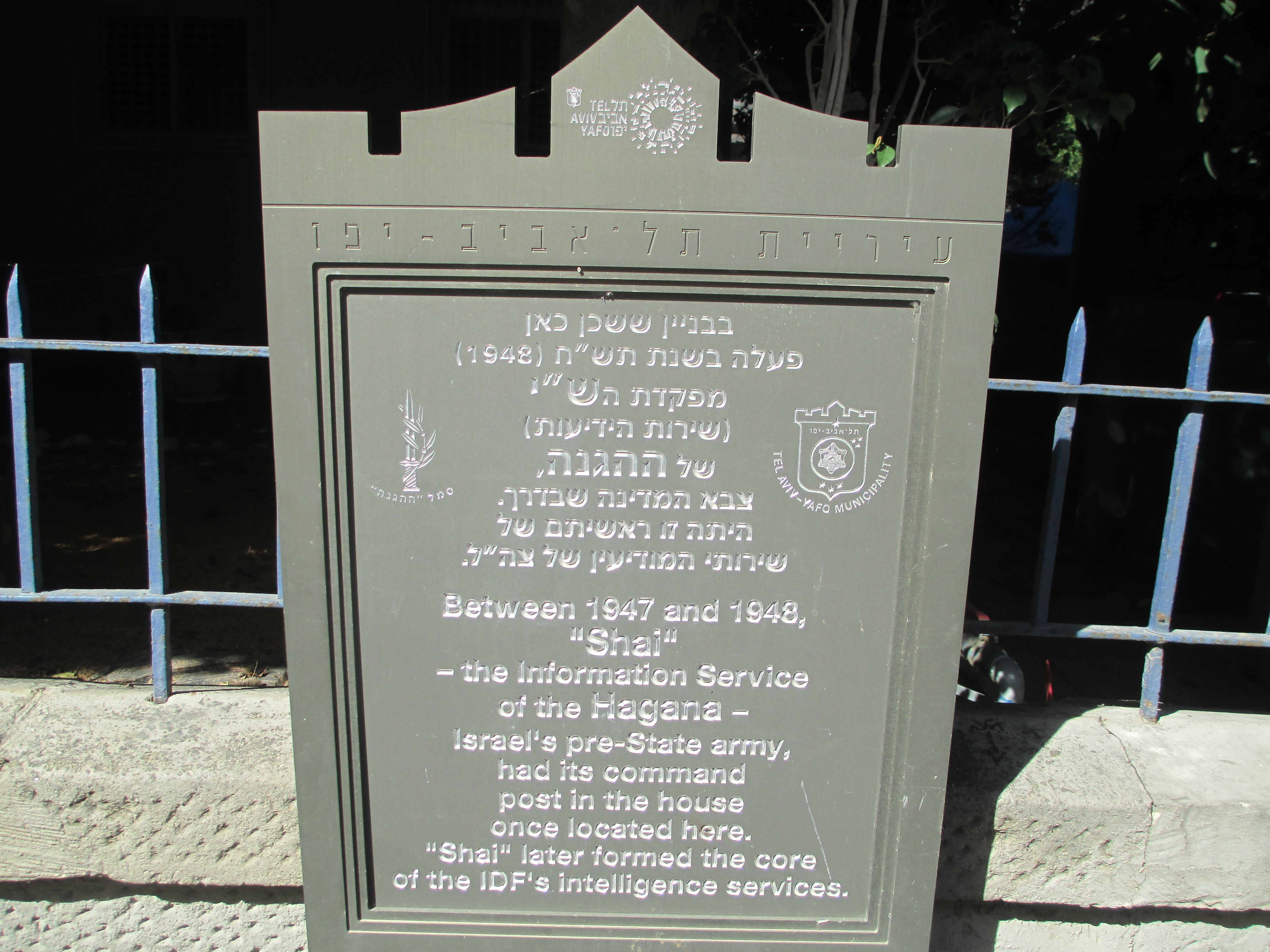 לוחית זיכרון ליד מפקדת ש"י בתל אביב ברחוב מלצ'ט 19